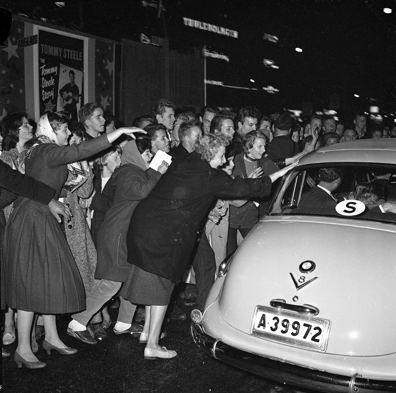 Biblioteksgatan 26, Biograf Anglais. Uppståndelse när Tommy Steele lämnar/anländer till konserten i bil